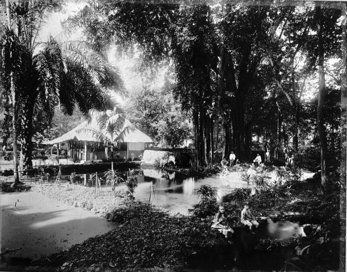 Foto. De badplaats en badhuis Pantjassan nabij Adjibarang.